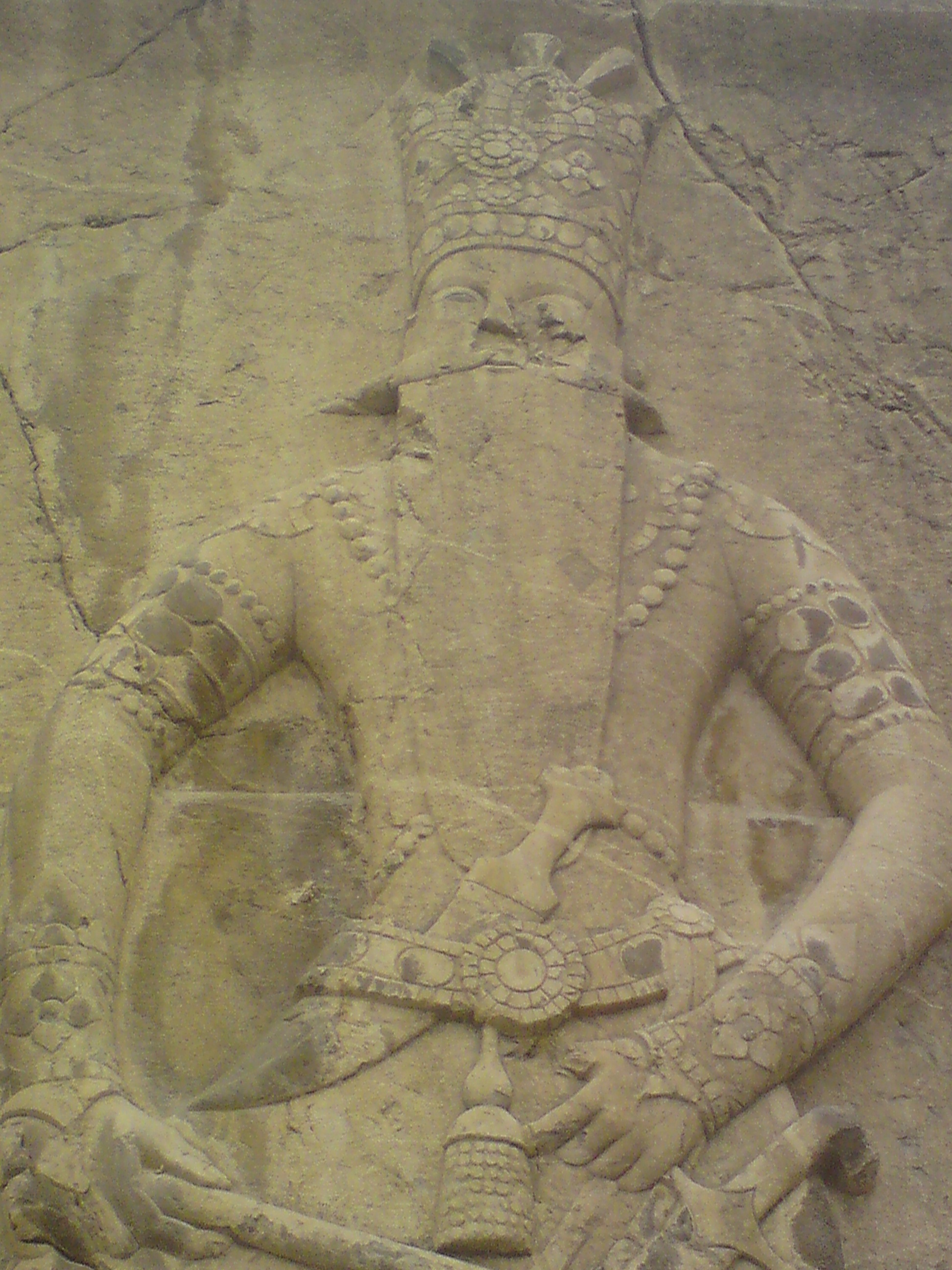 فتحعلی شاه قاجار